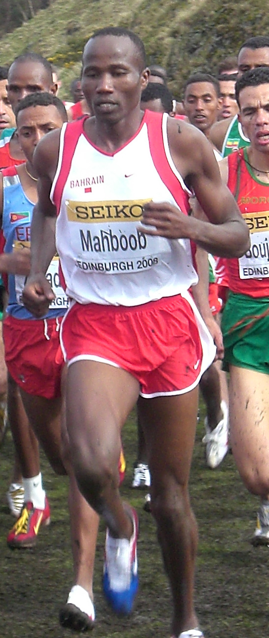 O atleta bahraní Hasan Mahboob, durante os mundiais de cross de 2008 Mahboob